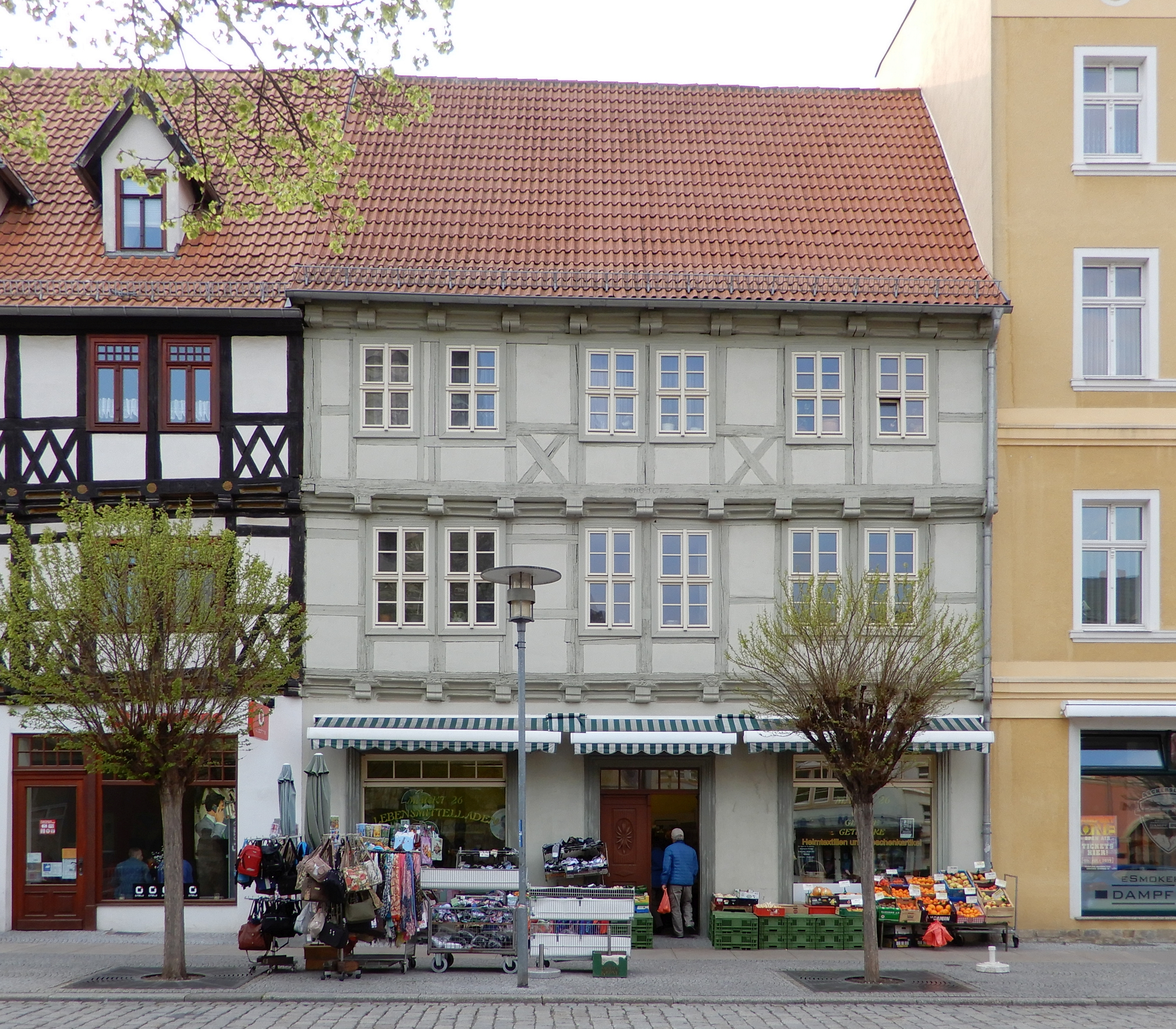 Gebäude Markt 26 in Aschersleben